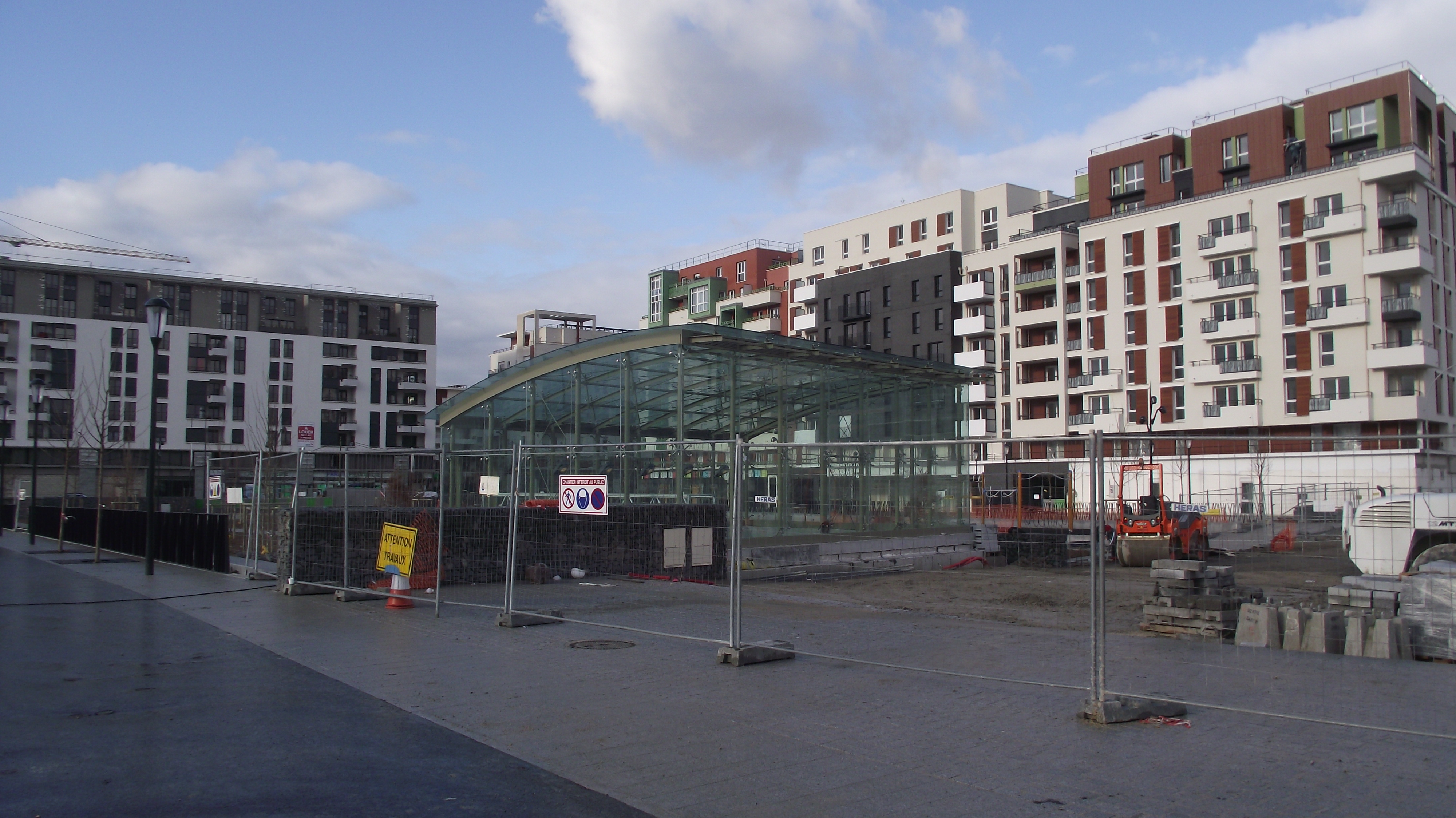 Het lichtdak op het plein om licht te laten binnendringen in het station.